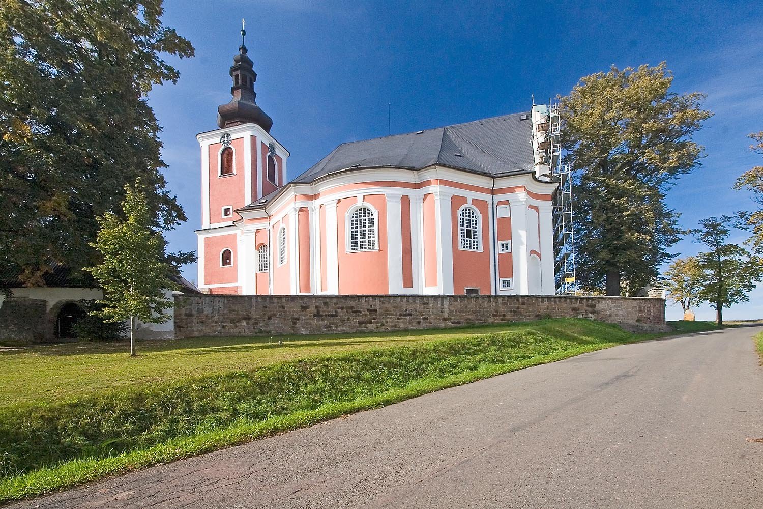 Božanov - Barokní kostel Svaté Máří Magdaleny